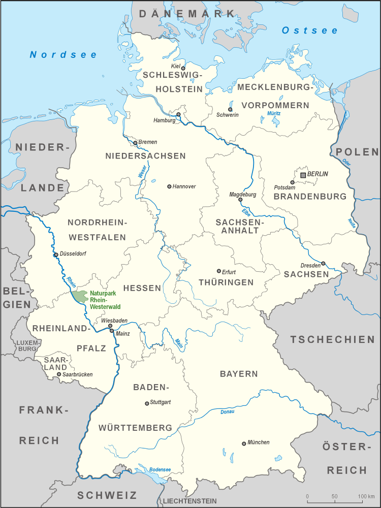 Karte des Naturparks Rhein-Westerwald in Deutschland